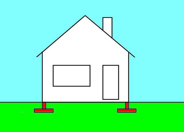 Plaatje van een fundering op staal, getekend door wikipediagebruiker: GeeKaa 31 aug 2005 13:17 (CEST)